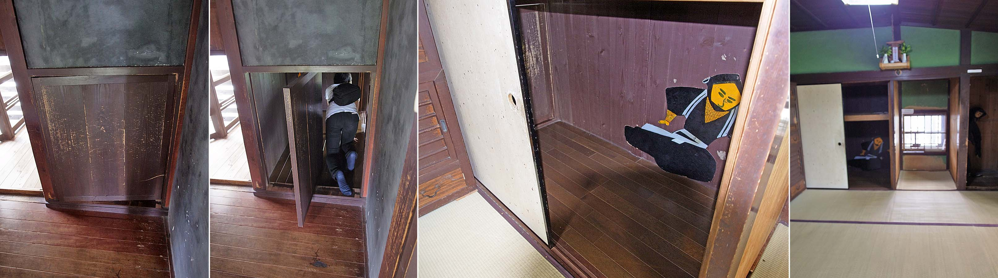 Koga-ryu Ninjya House , 甲賀流忍術屋敷